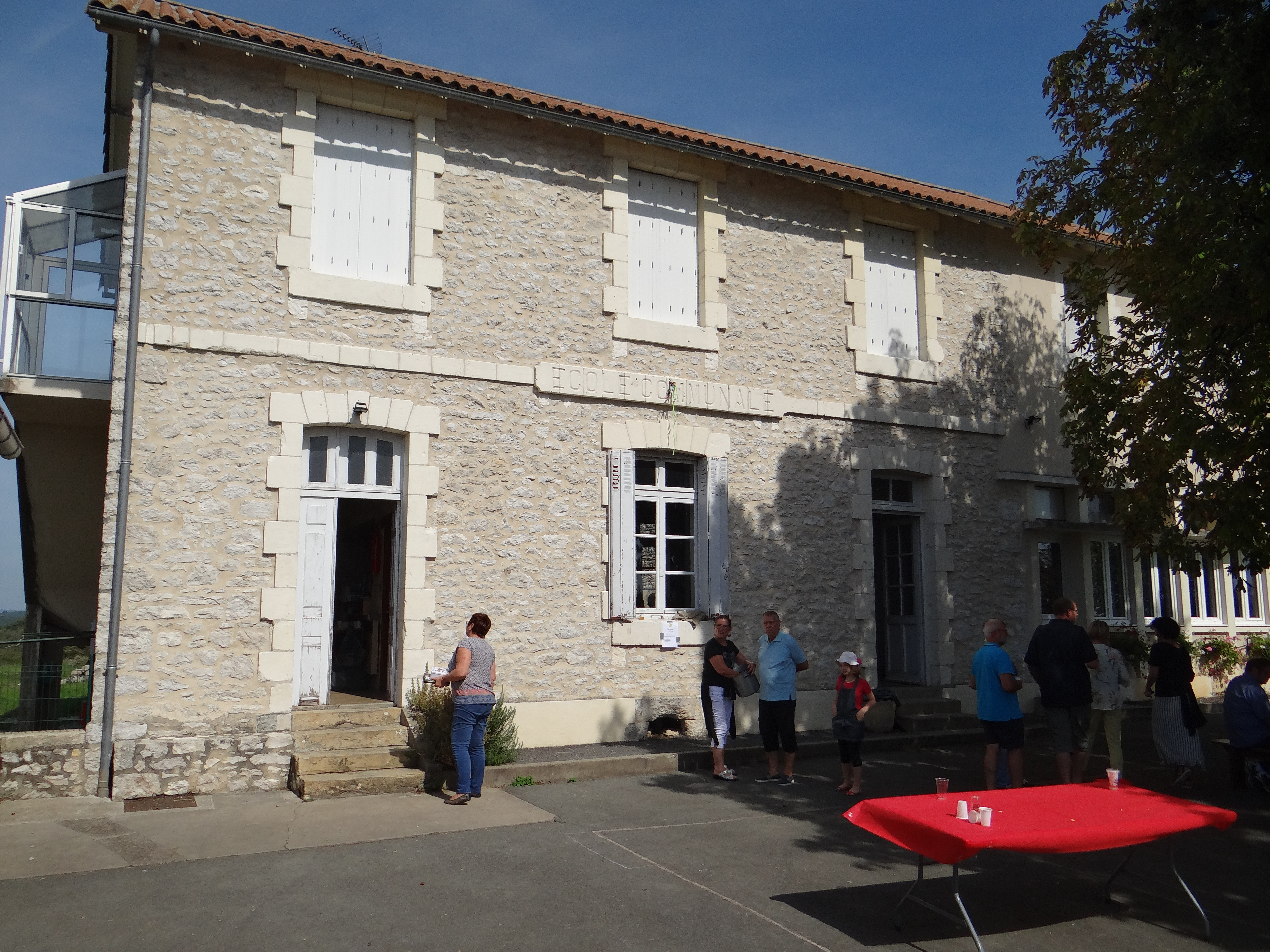 Salle des fêtes dans d'anciens locaux scolaires à Mayrac (Lot, France)